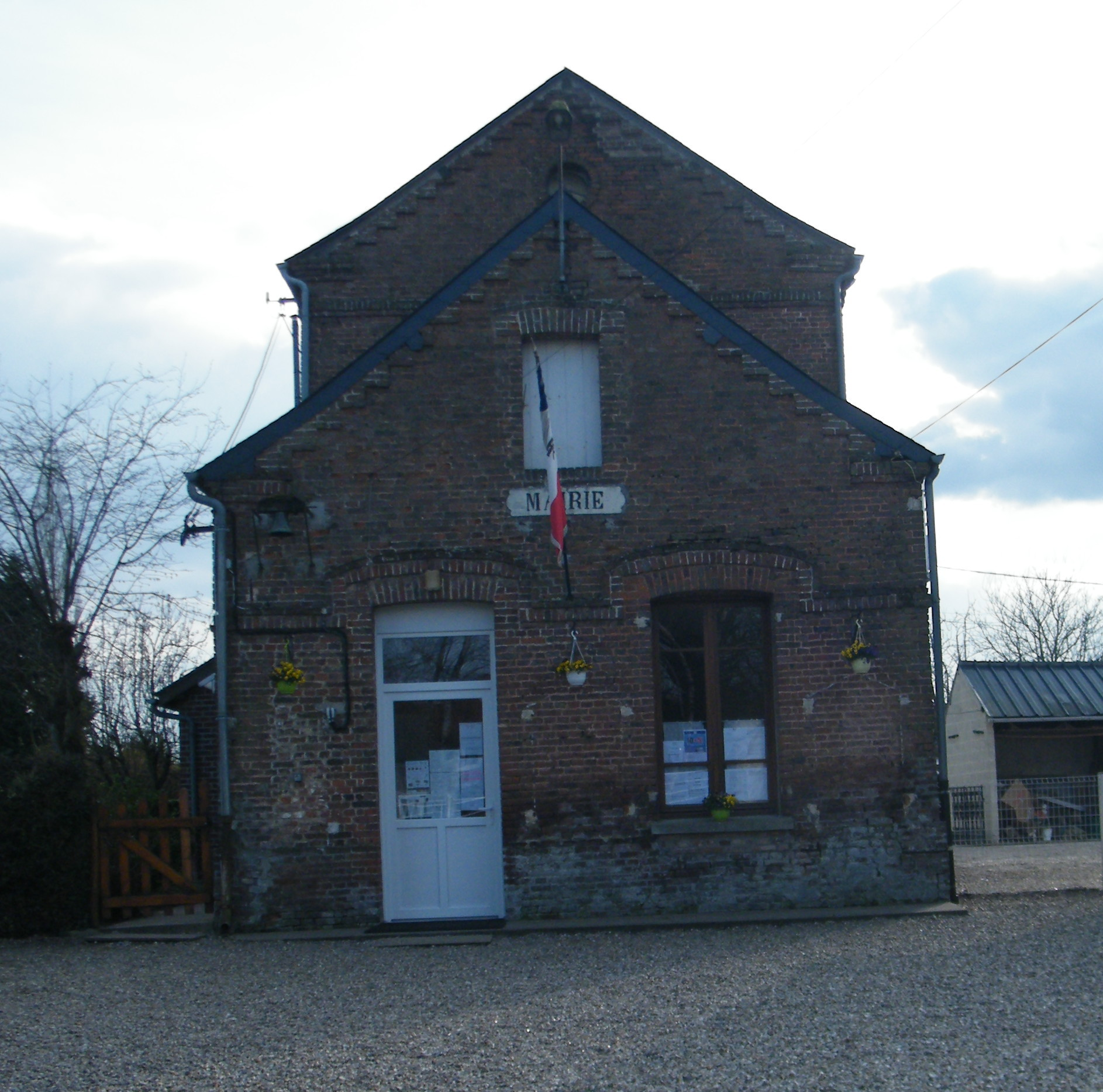 La mairie.